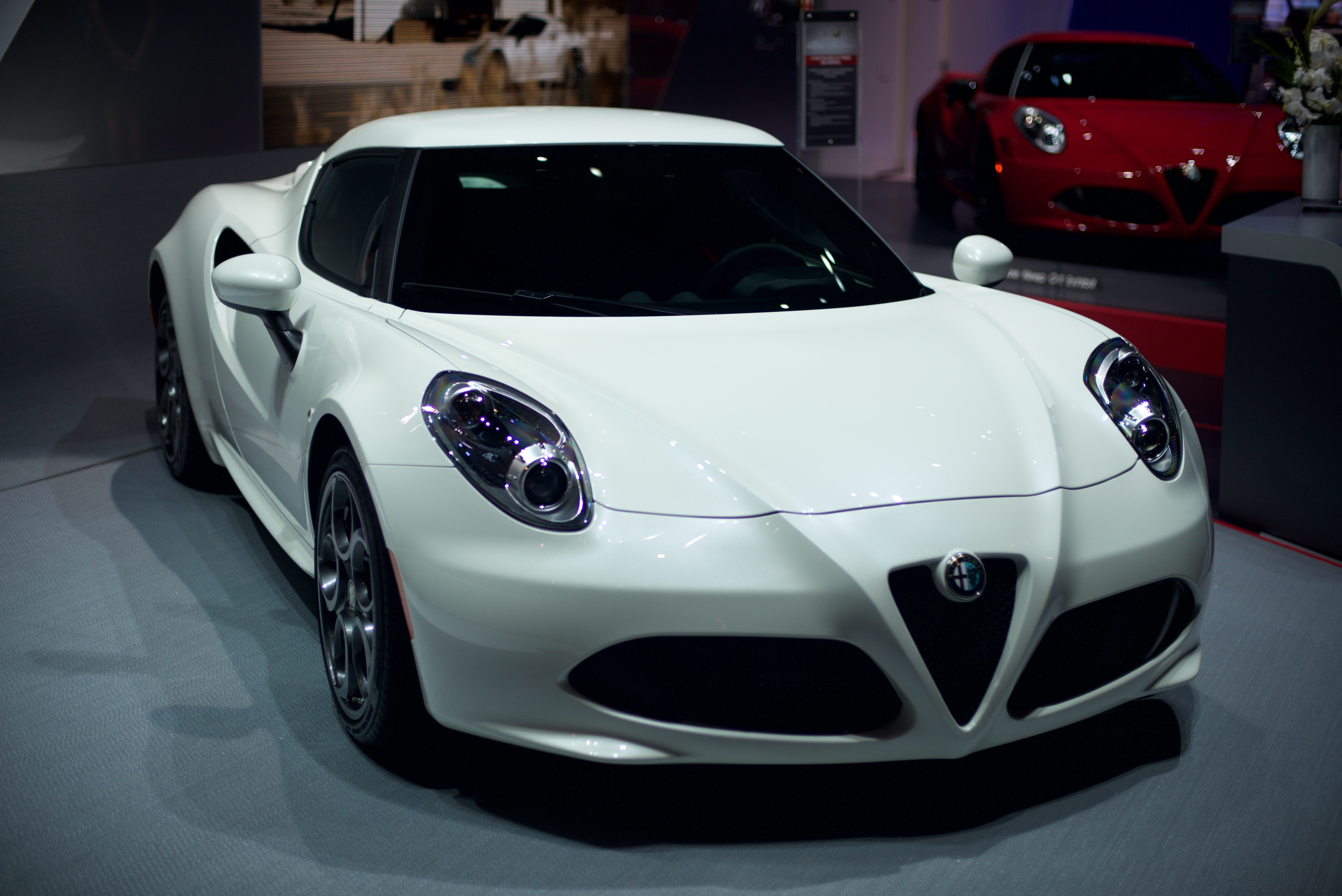 SLY_5772